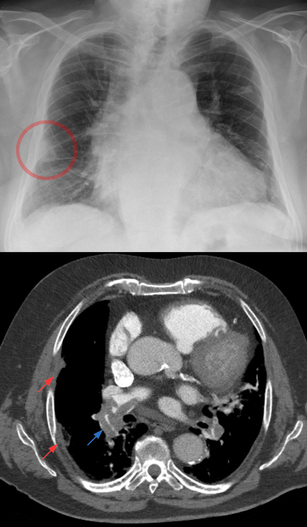 "Hampton's hump" als Korrelat für kleine periphere Lungeninfarkte bei einer schweren pulmonalarteriellen Embolie. Diese ist im unteren Bildteil mit der Computertomographie dargestellt (blauer Pfeil).